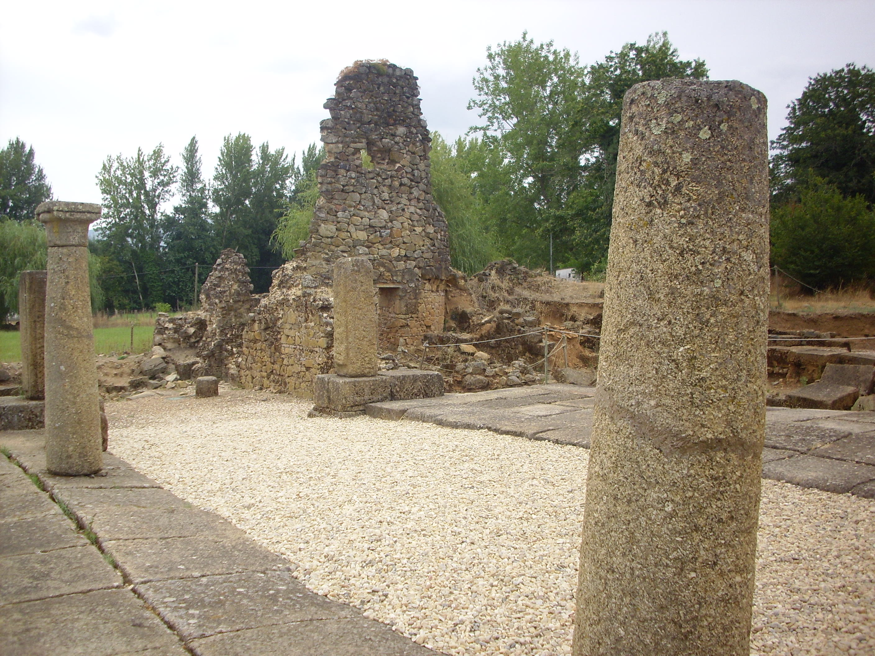 São Salvador da Aramenha - Marvão